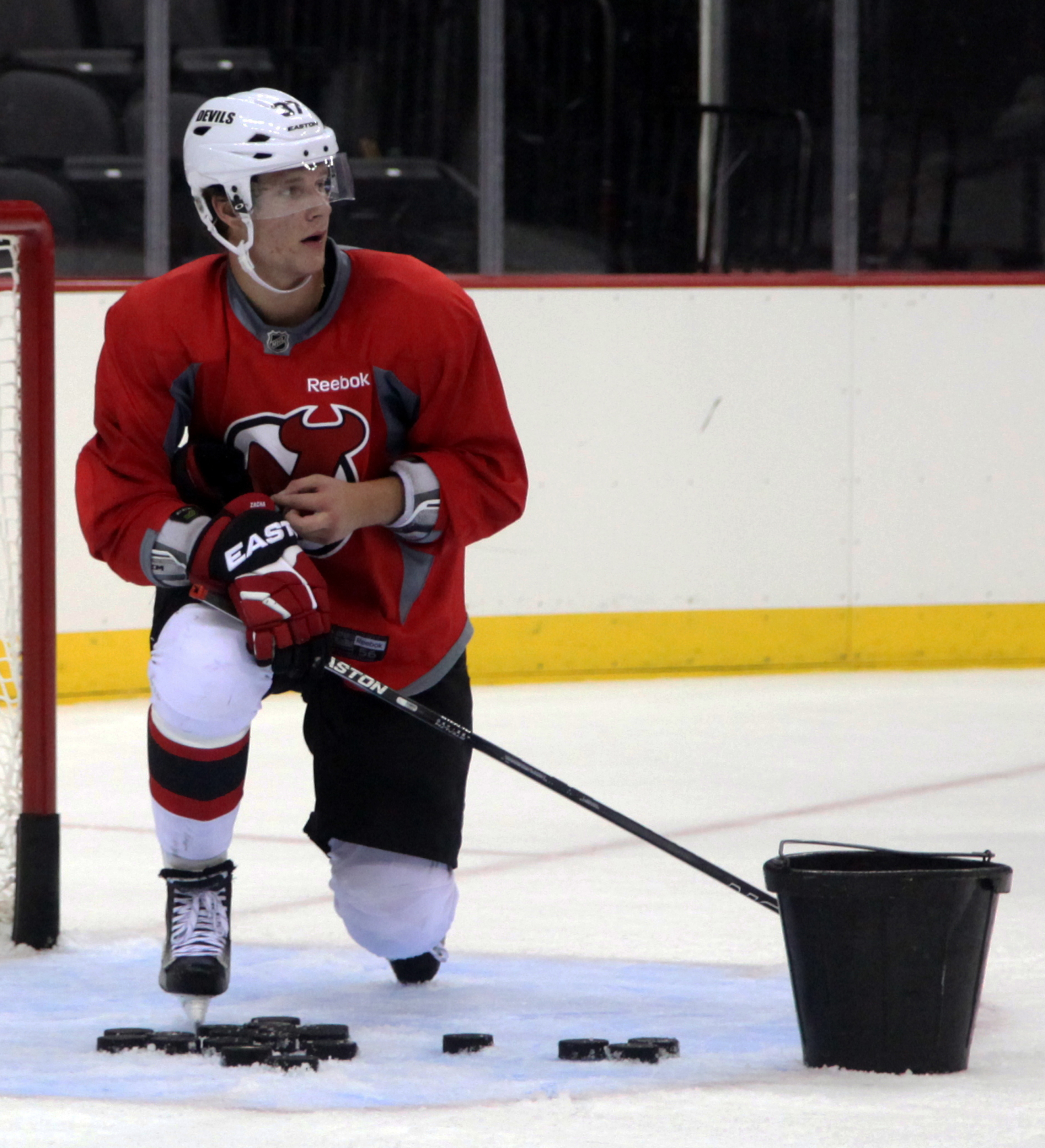 Zacha in September 2015.